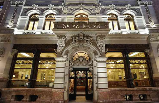 Fachada del Real Casino de Murcia